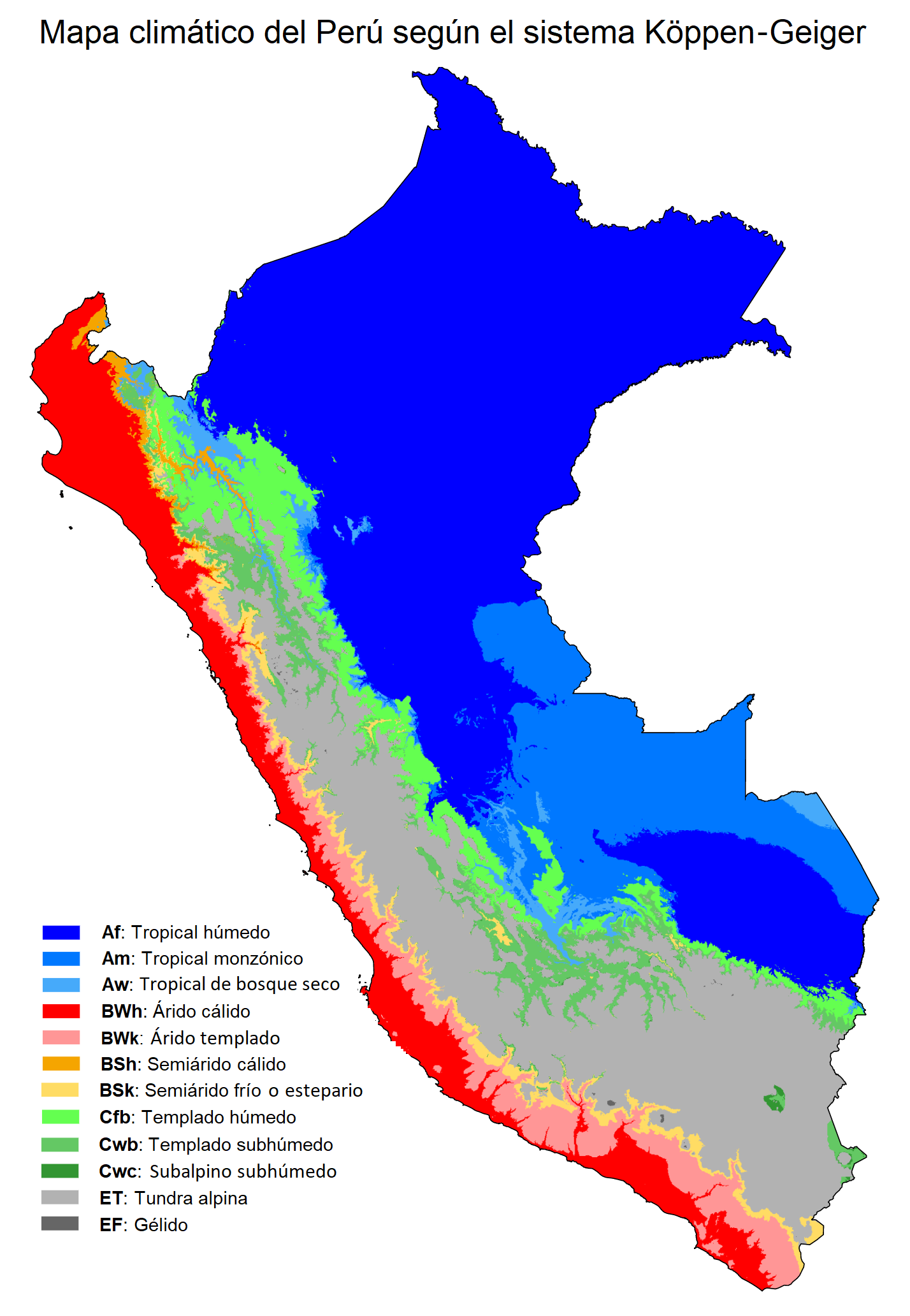 Mapa climático del Perú según el sistema Köppen-Geiger del periodo 1980-2016